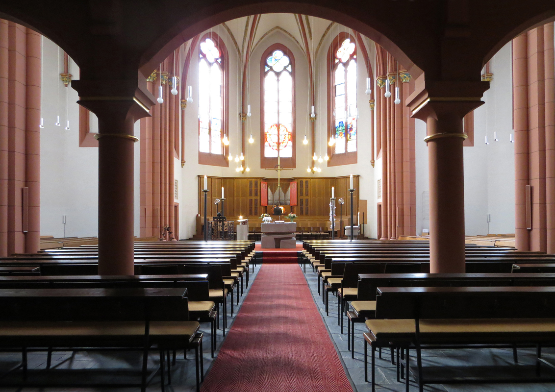 Inneres der evangelischen Christuskirche, Dudweiler, Stadt Saarbrücken, Saarland